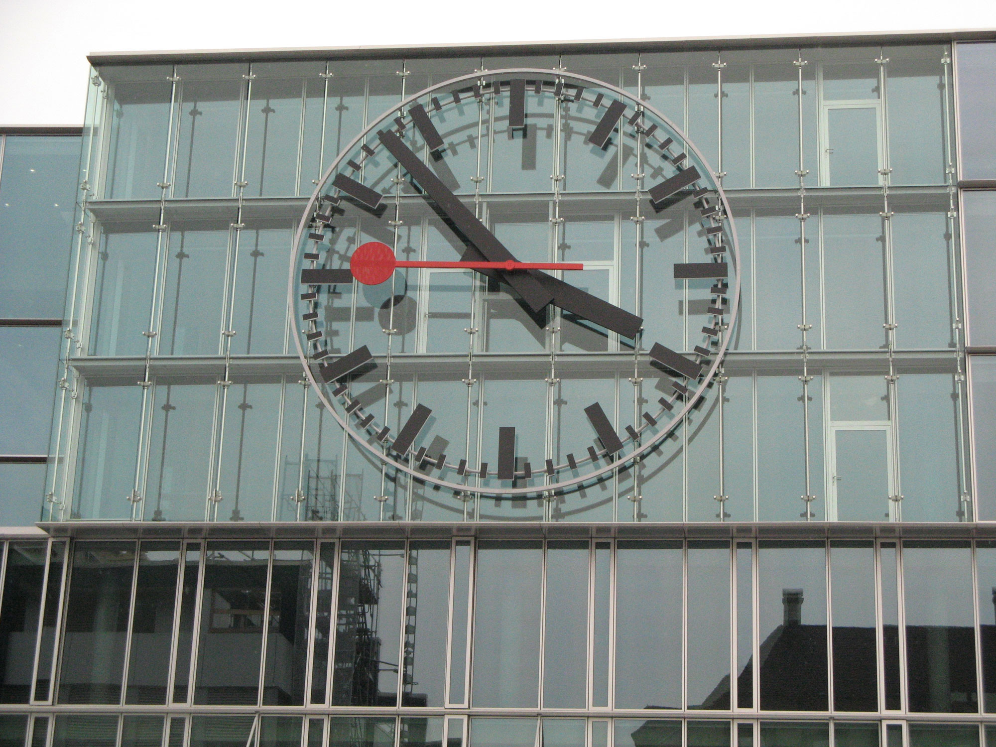 Die Uhr am Bahnhof Aarau, grösstes Zifferblatt Europas